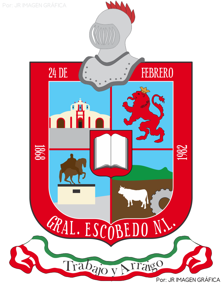 Escudo de Armas de Escobedo NL